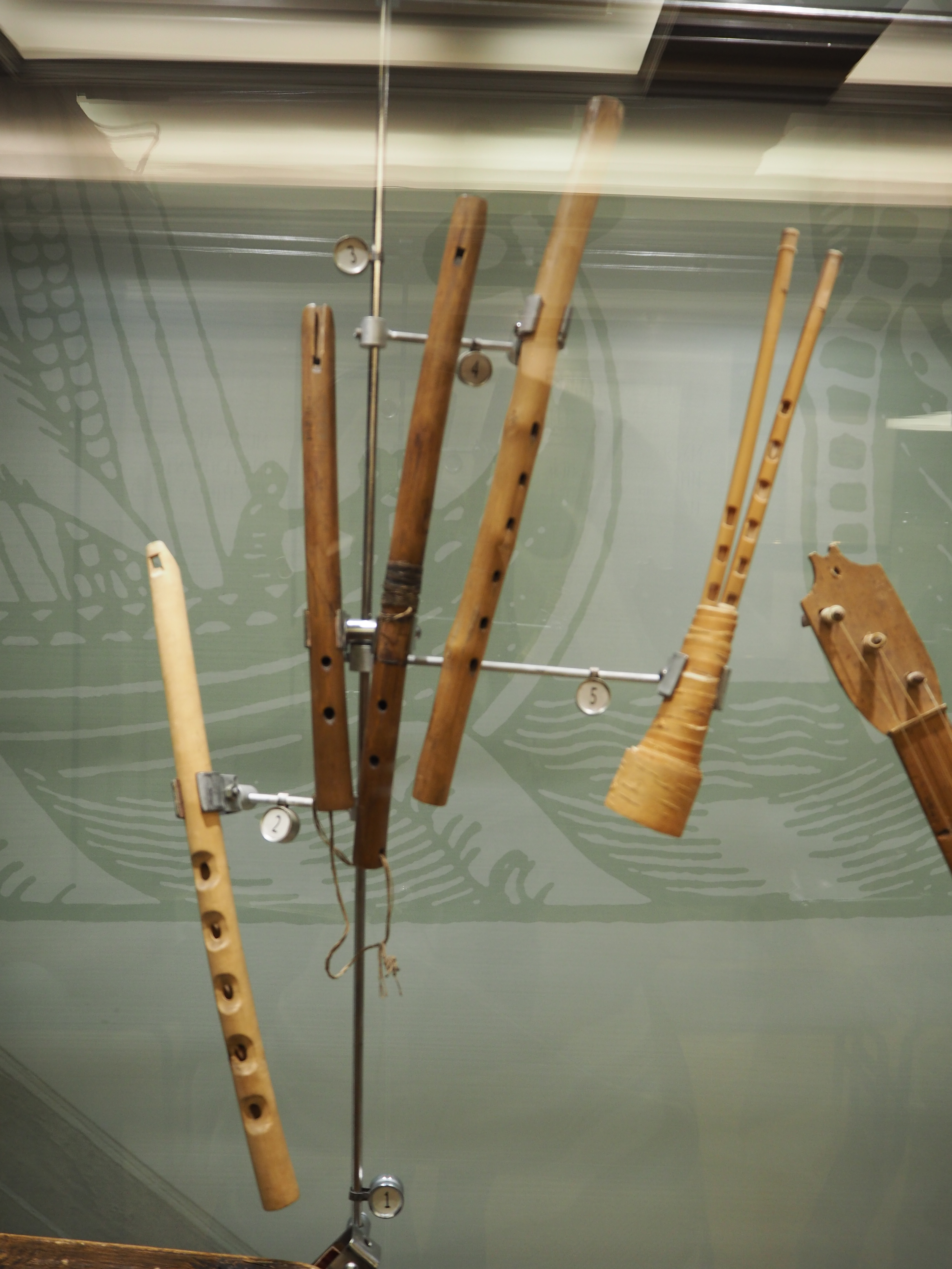 Русские народные музыкальные инструменты XIX-XX веков. 2 - дудка, 3 - дудка-двойчатка, 4-пыжатка, 5-тростниковые дудки (двойная жалейка).